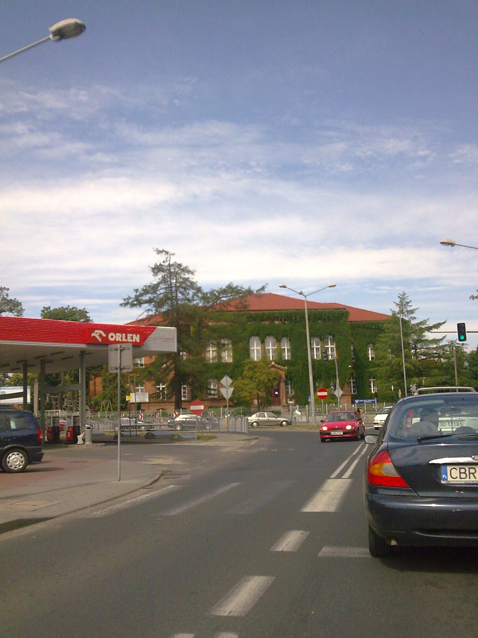 Brodnica - w oddali budynek przy skrzyżowaniu ulic: Lidzbarskiej i Mazurskiej